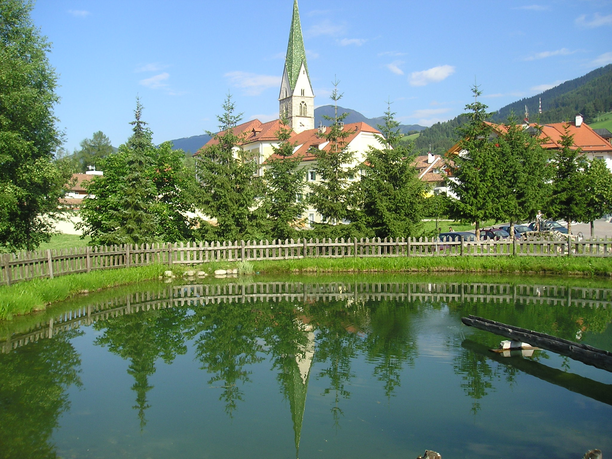 Sicht auf das historische Ortszentrum von Terenten. Urheber: Brunner Christoph, Gemeinde Terenten Genehmigung: Das Bild wird nach Absprache mit dem Bürgermeister zur Verfügung gestellt, und darf veröffentlicht werden. Andere Versionen: keine vorhanden